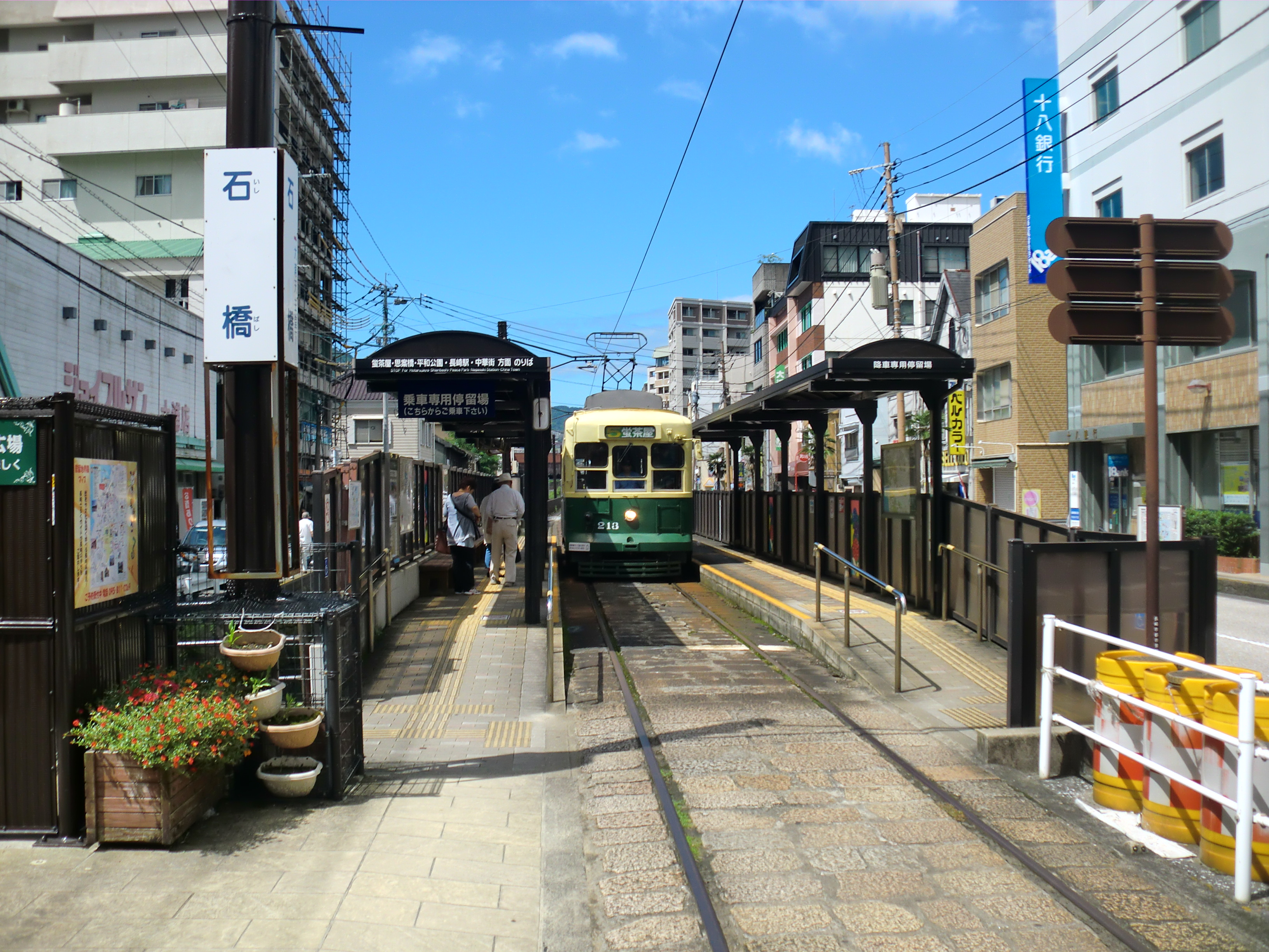 長崎電気軌道石橋駅